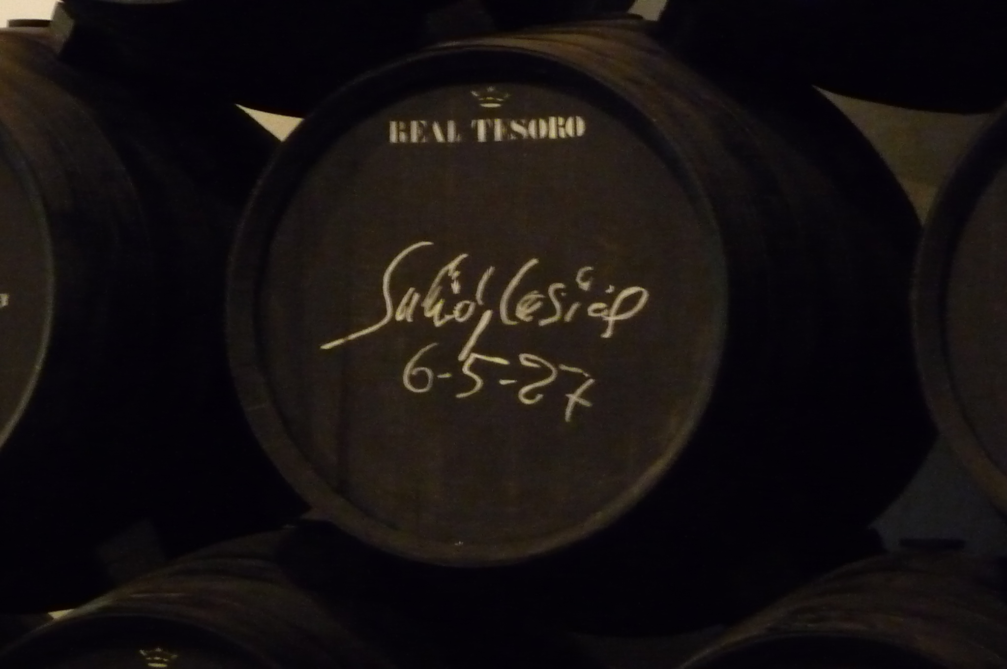 JulioIglesias-p1000035.jpg